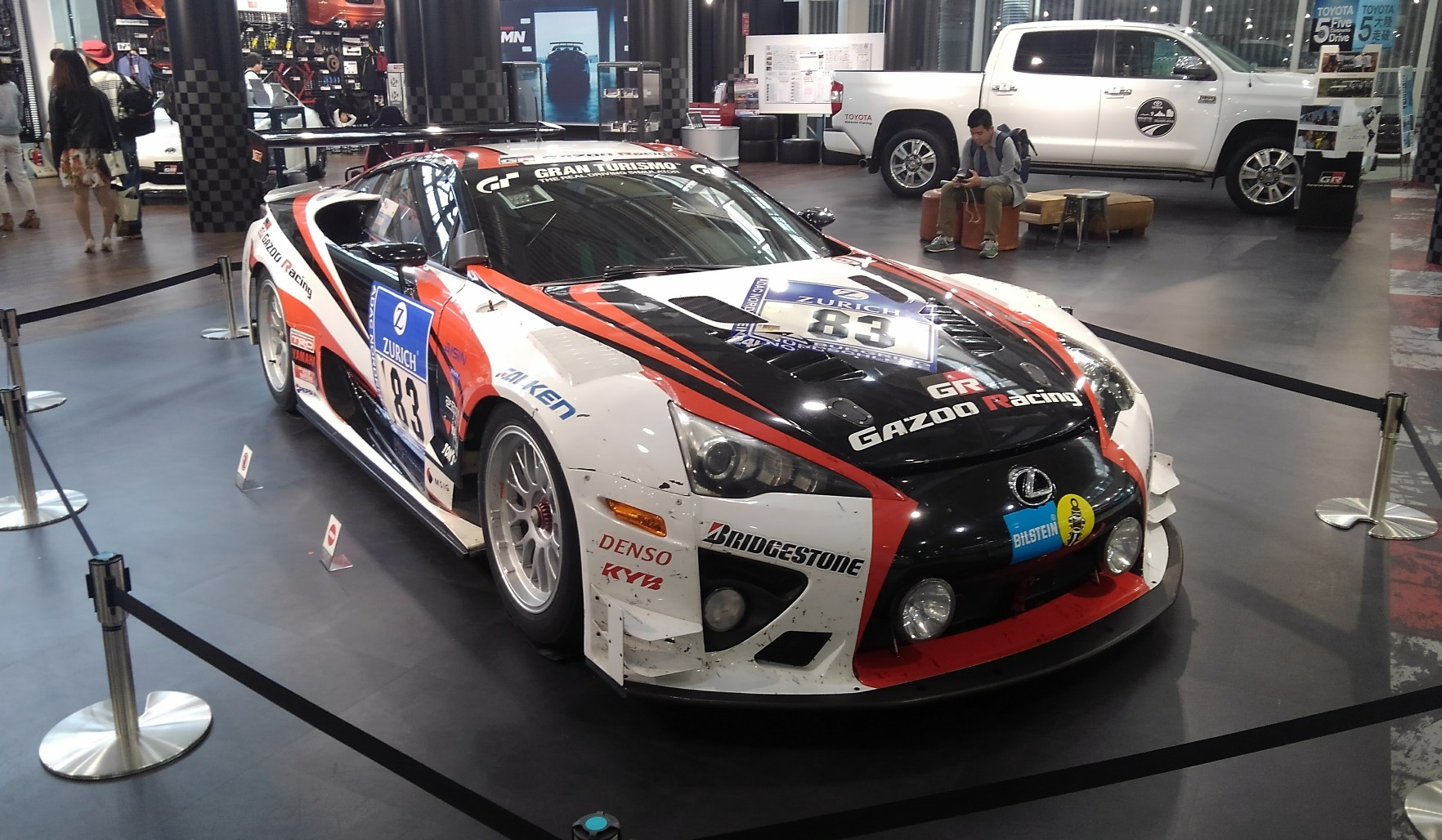 レクサス・LFAの2012年ニュル参戦車